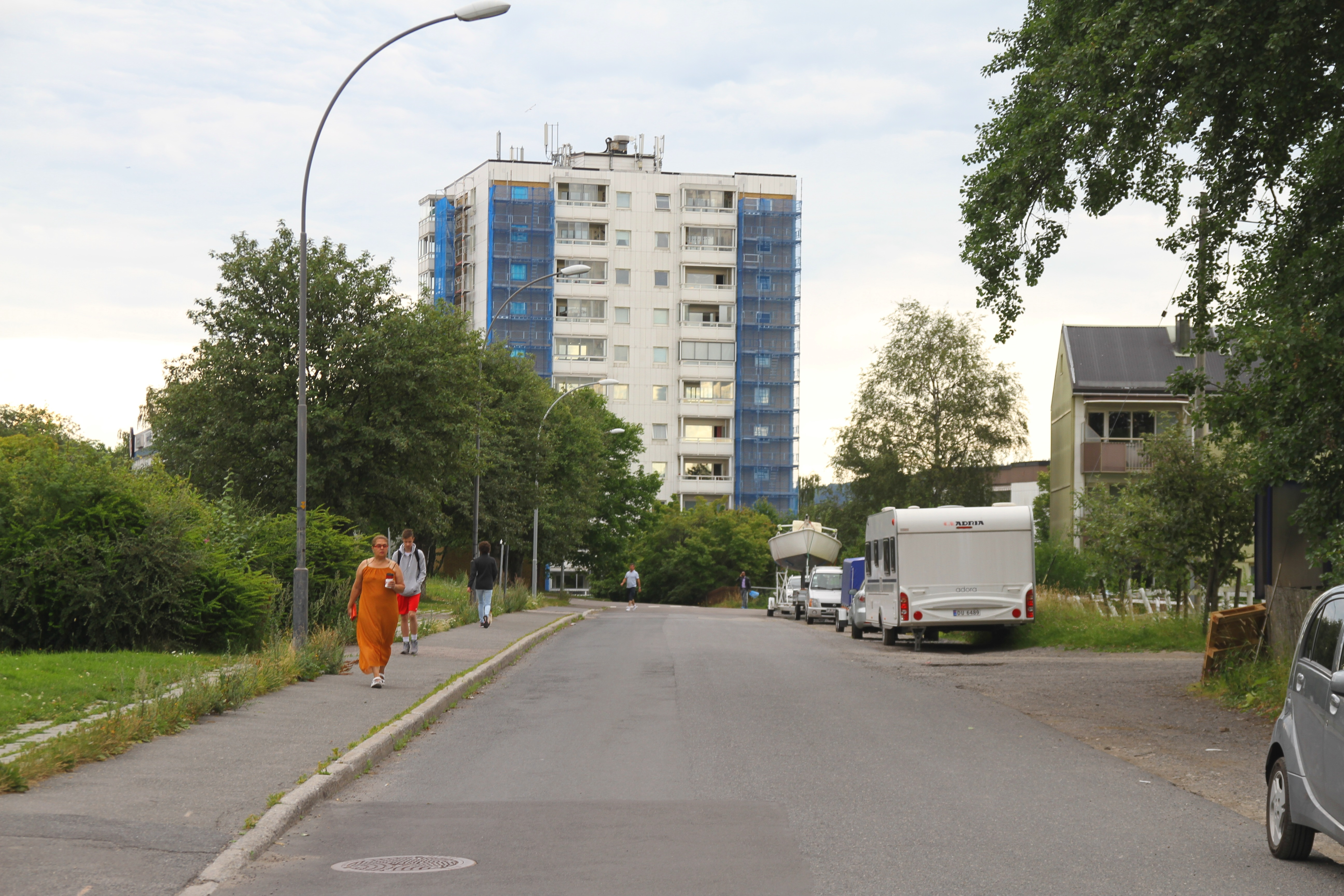 Gårdsveien, Oslo